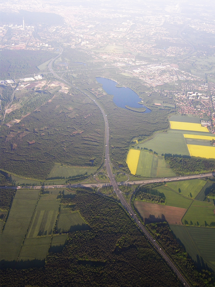 Luftbild Von Hannover / Region Hannover (von Norden nach Süden aufgenommen)